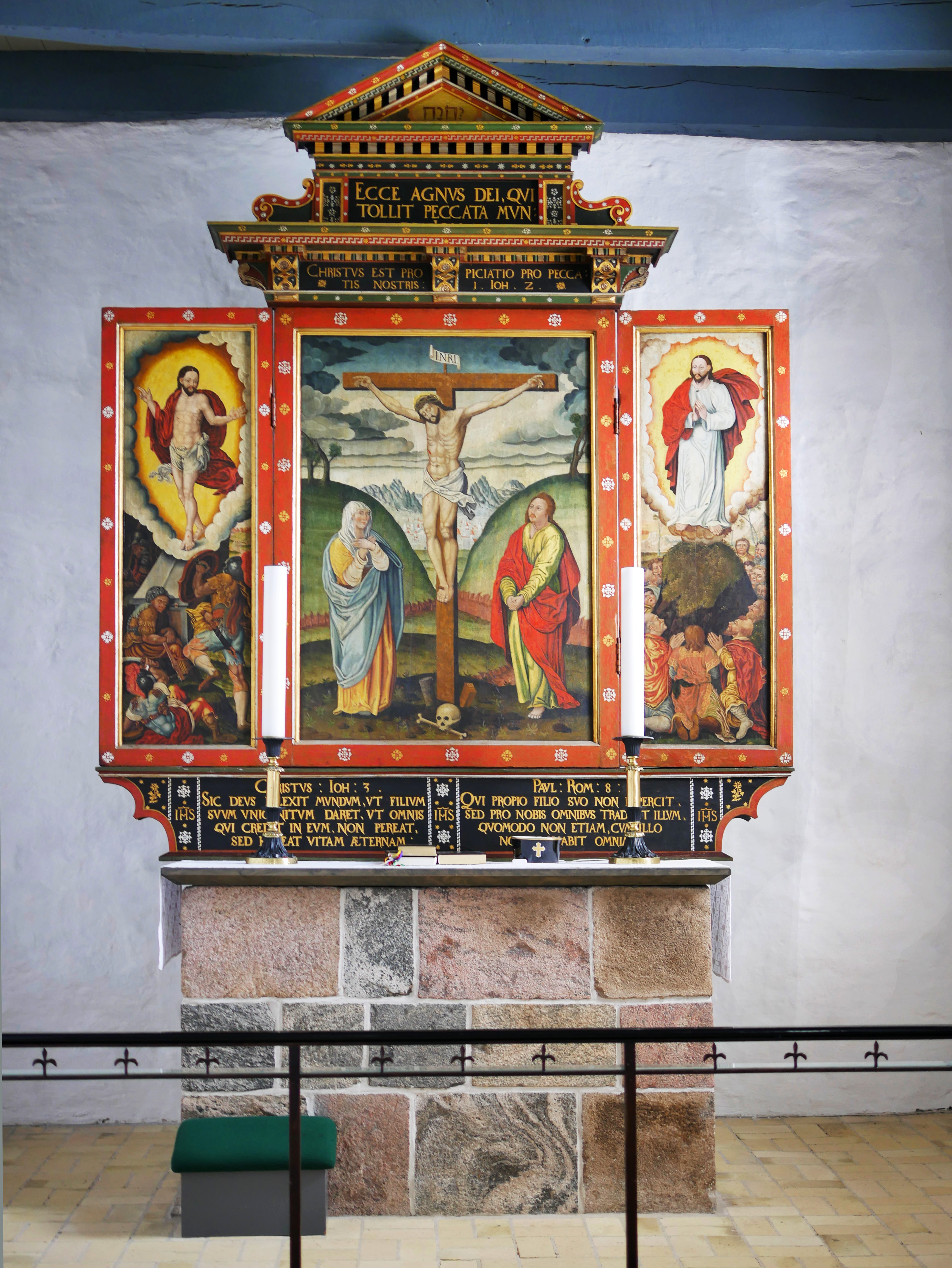 Kirche von Vive am Mariagerfjord (Dänemark, Nord-Jütland)- Erbaut etwa 1250, schöne Innenausstattung: romanischer Taufstein, Renaissacealter, Kanzel aus dem Historismus, moderne Orgel Renaissancealtar